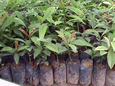 Bibit Asam Gelugur Siap Tanam. Desa Petatal, Batu Bara, Sumut.